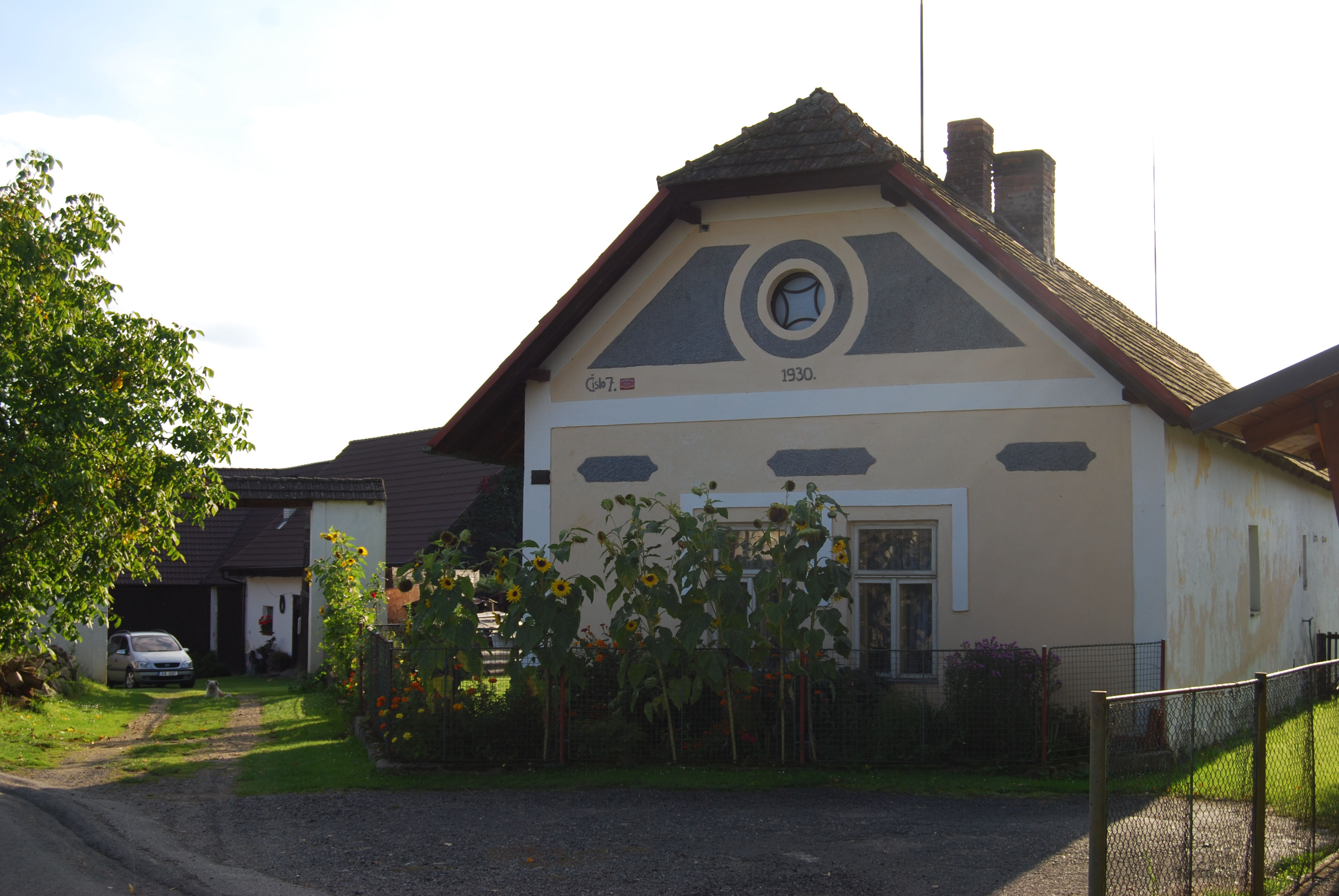 Dům čp. 7 v obci. Rakov je část obce Bernartice v okrese Písek. Česká republika.